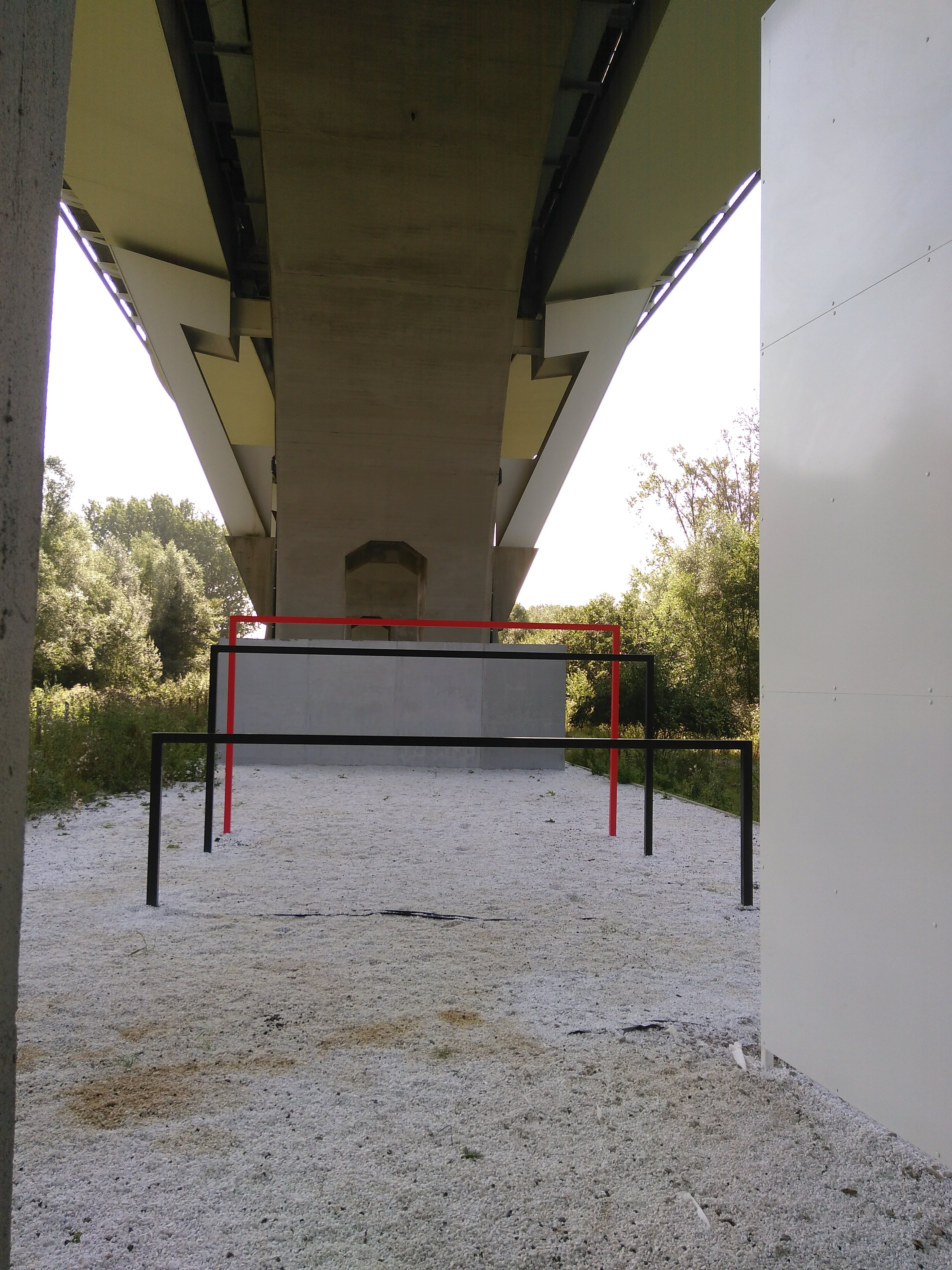 Kunstwerk van Koen van den Broek